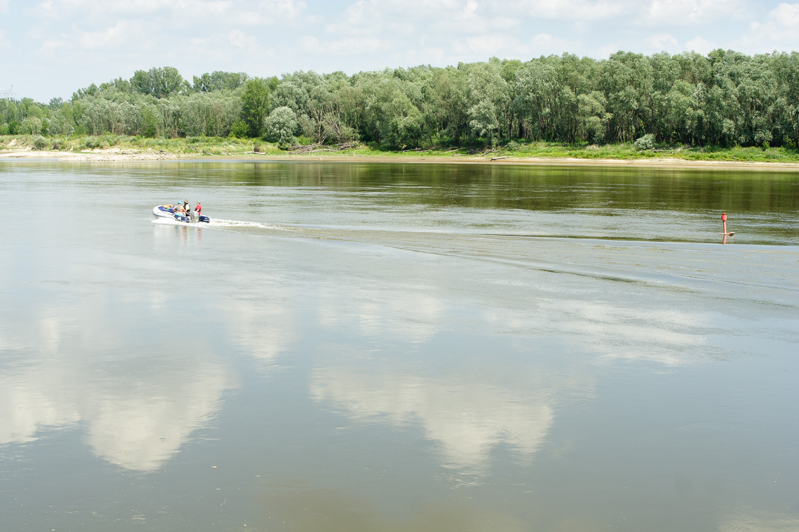 Brzeg Kępy Wieloryb na wysokości ujścia Wilanówki. Widok z Zawad. This is a photography of Natura 2000 protected area with ID PLB140004